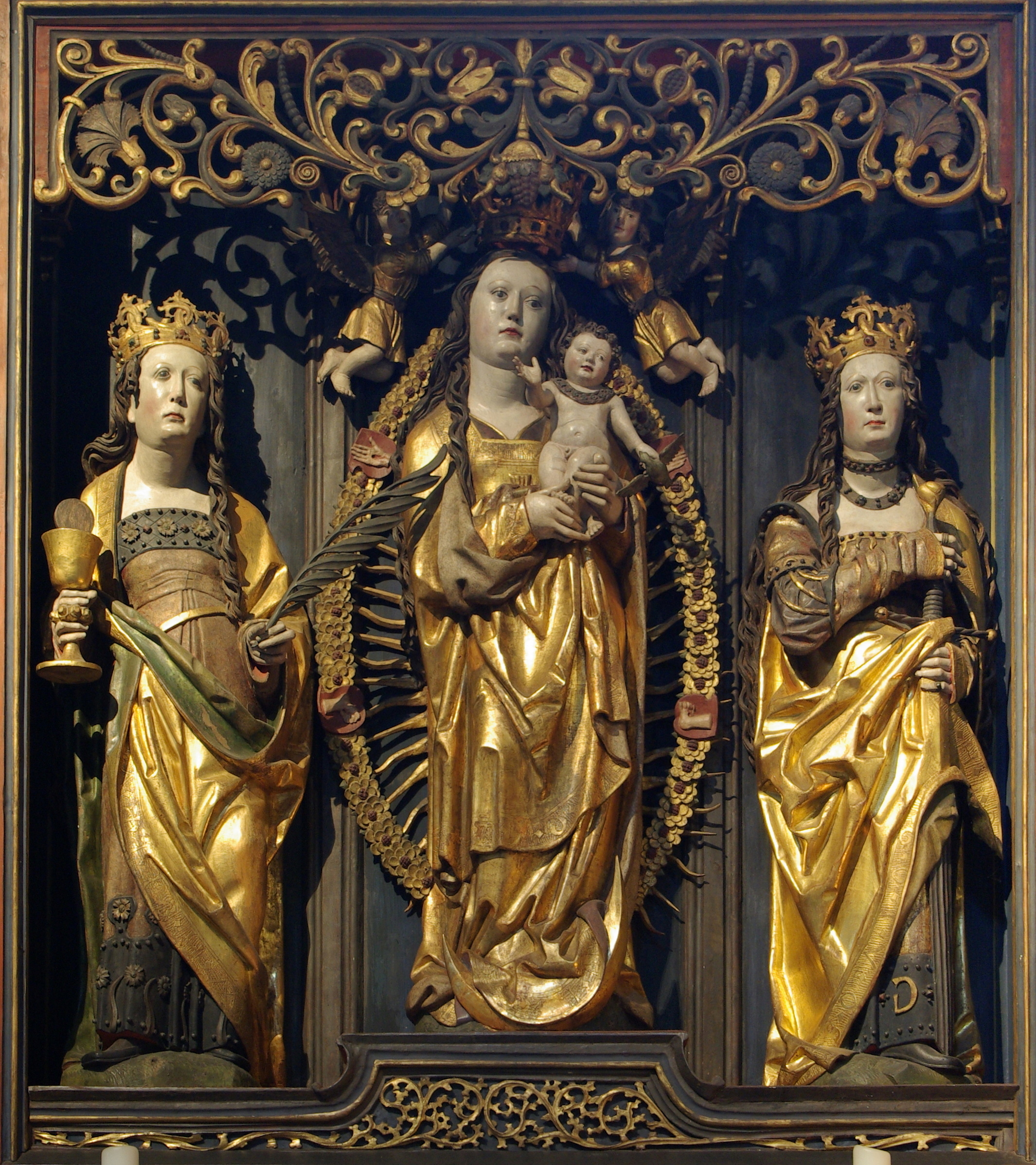 Bamberger Dom, Kirchgattendorfer Altar, Mittelteil